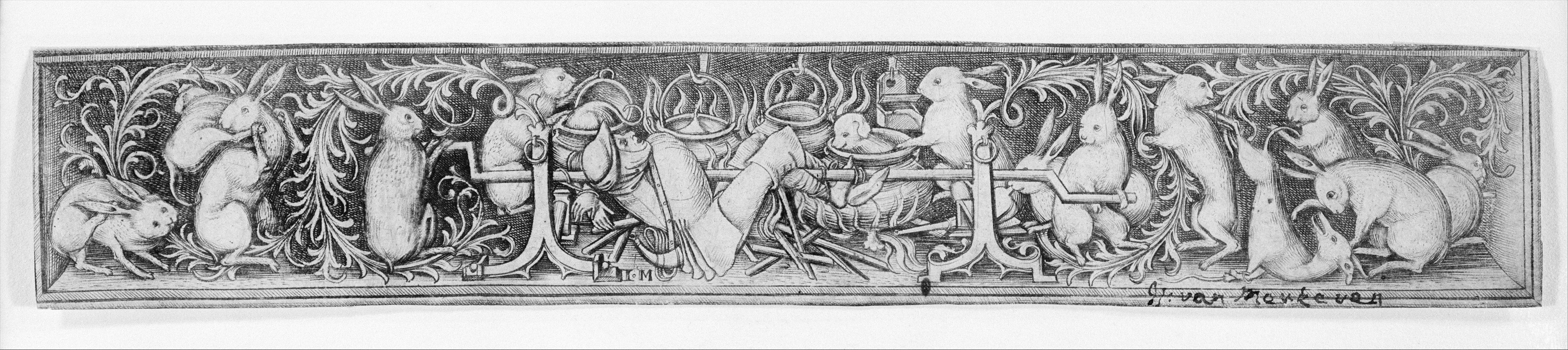 Hares Roasting the Hunter Israhel van Meckenem (German, Meckenem ca. 1440/45–1503 Bocholt)